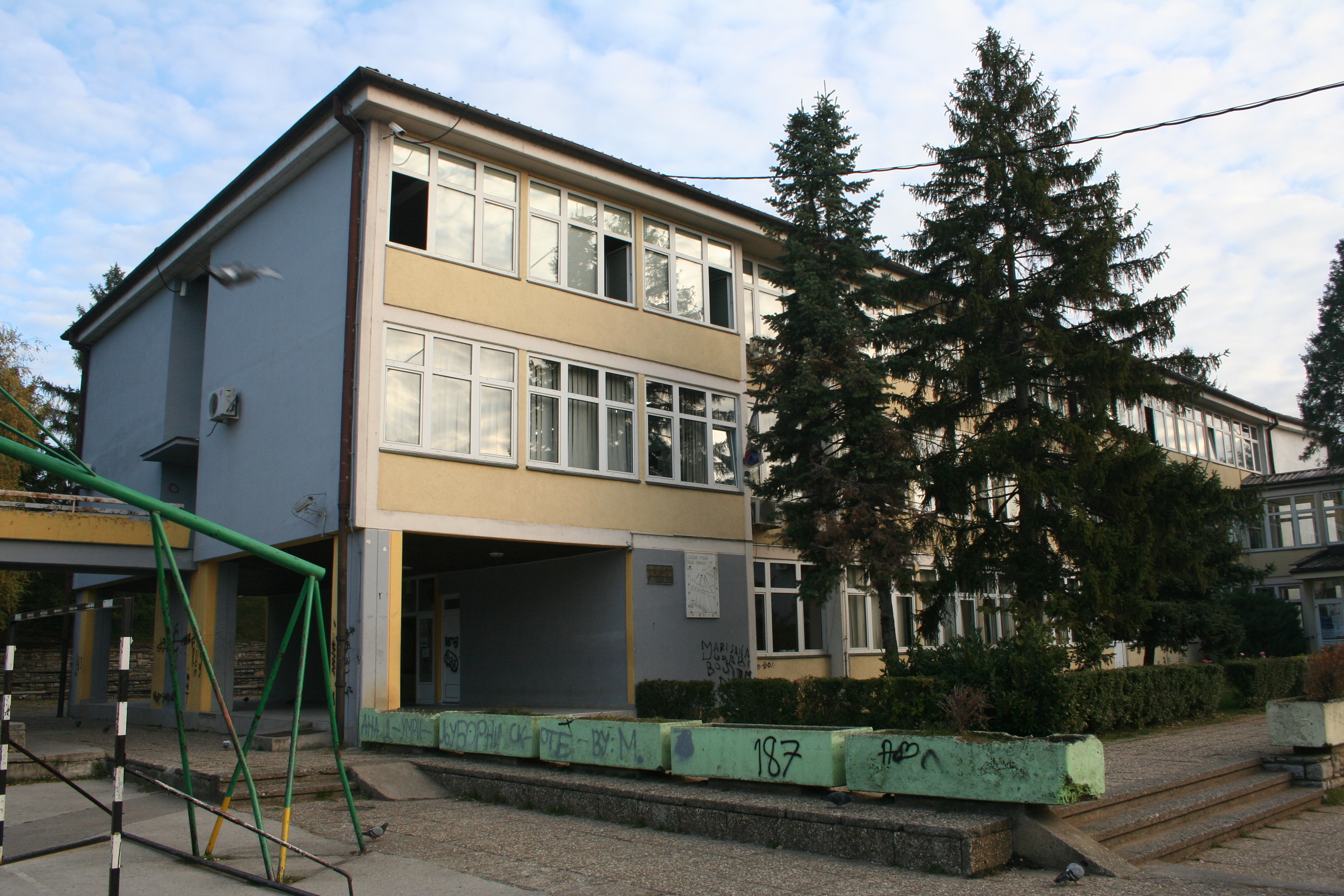 OŠ Andra Savčić Valjevo